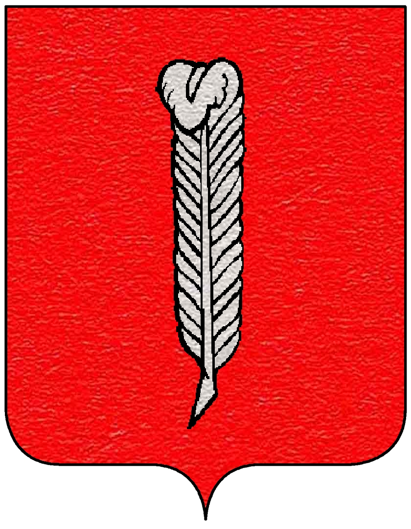 Stemma della famiglia Arcipreti della Penna Crispolti